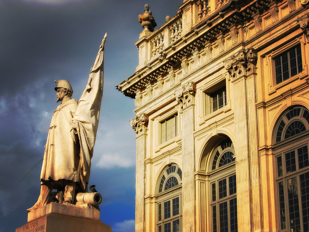 Torino, Piemonte, Italia